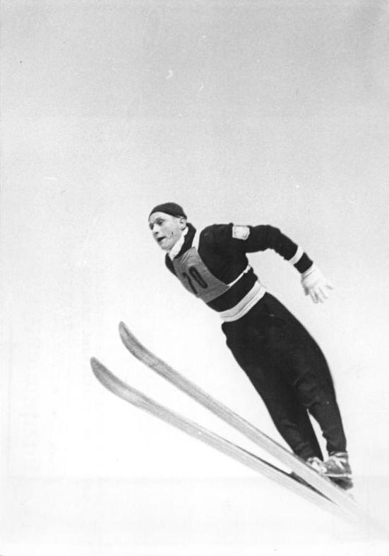 Zentralbild Wlocka 2.3.1954 V. Wintersport-Meisterschaften der Deutschen Demokratischen Republik vom 25. - 28.2.1954 in Oberhof Diesen Wintersportmeisterschaften kommt durch die Teilnahme von Sportlern aus Frankreich, der Volksrepublik Polen, der Ungarischen Volksrepublik und Westdeutschland besondere Bedeutung zu. Der Höhepunkt der V. Wintersportmeisterschaften war der Spezialsprunglauf mit internationaler Besetzung auf der Thüringenschanze am 28.2.1954. Unter den zahlreichen Ehrengästen befand sich auch der Präsident der Volkskammer der Deutschen Demokratischen Republik Dr. h.c. Johannes Dieckmann. UBz: Sieger beim Spezialsprunglauf wurde der polnische Sportfreund Antonie Wieczorek.